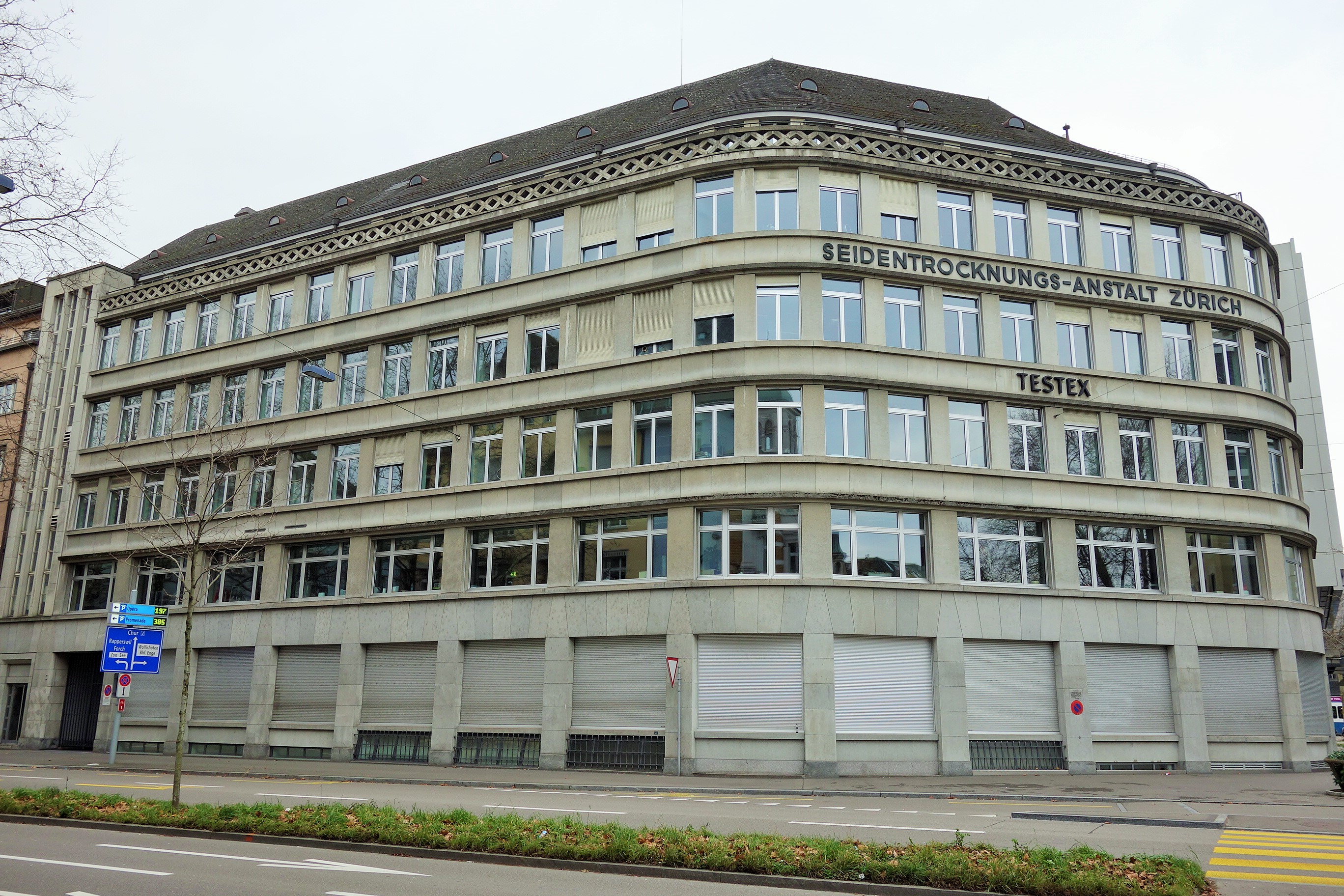 Testex, Zürich, Schweiz